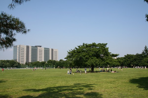 武蔵野中央公園, taken by Kazubon, in 21 May 2006